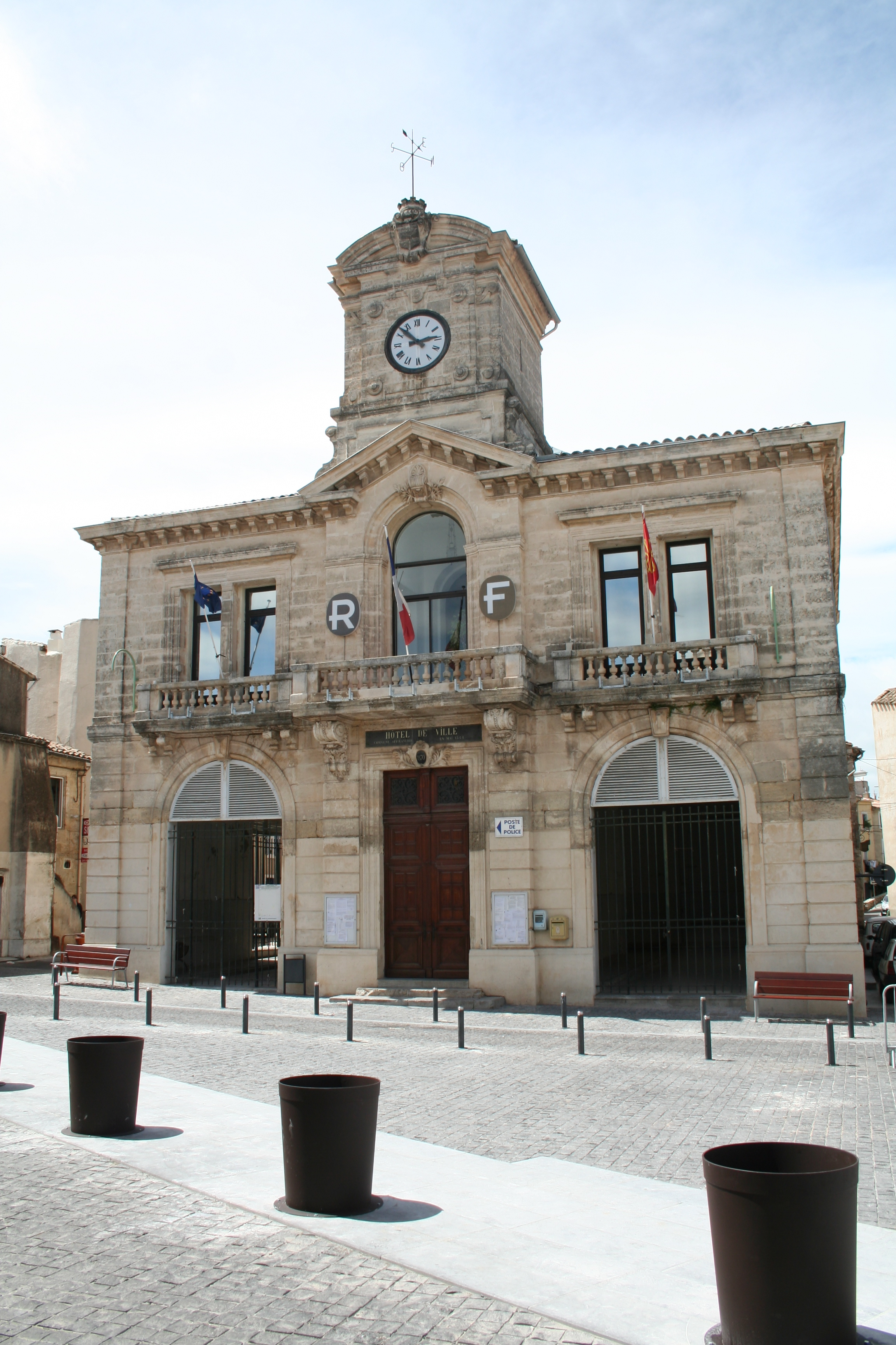 Cournonterral (Hérault) - Mairie.